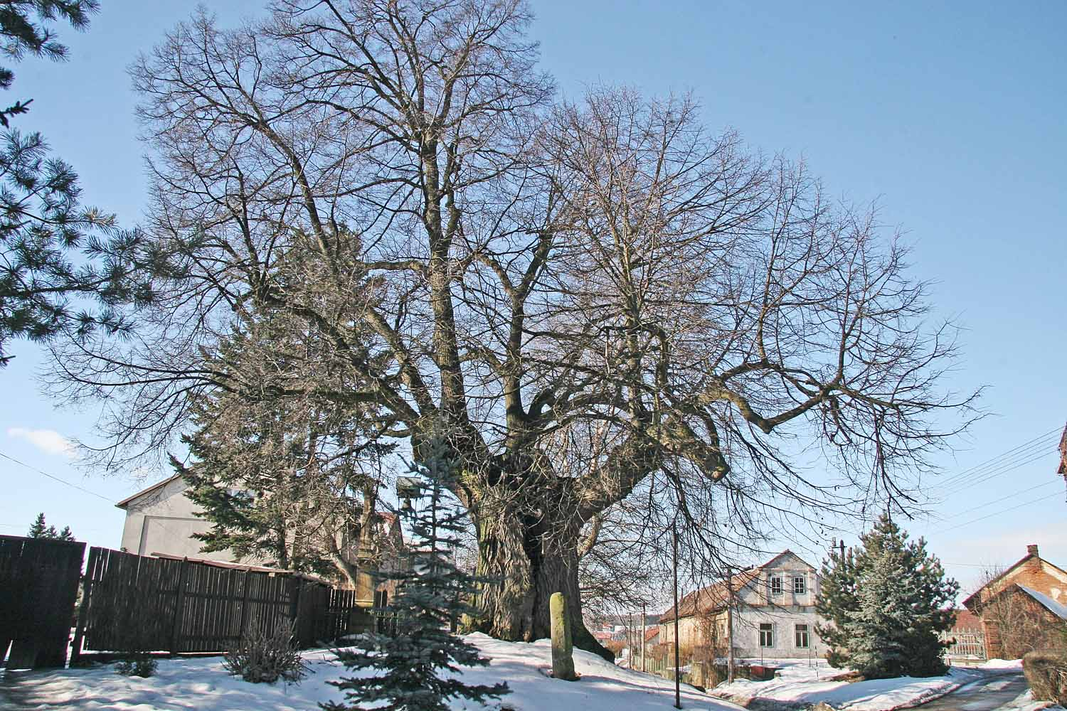 Památná lípa malolistá v obci Sendražice